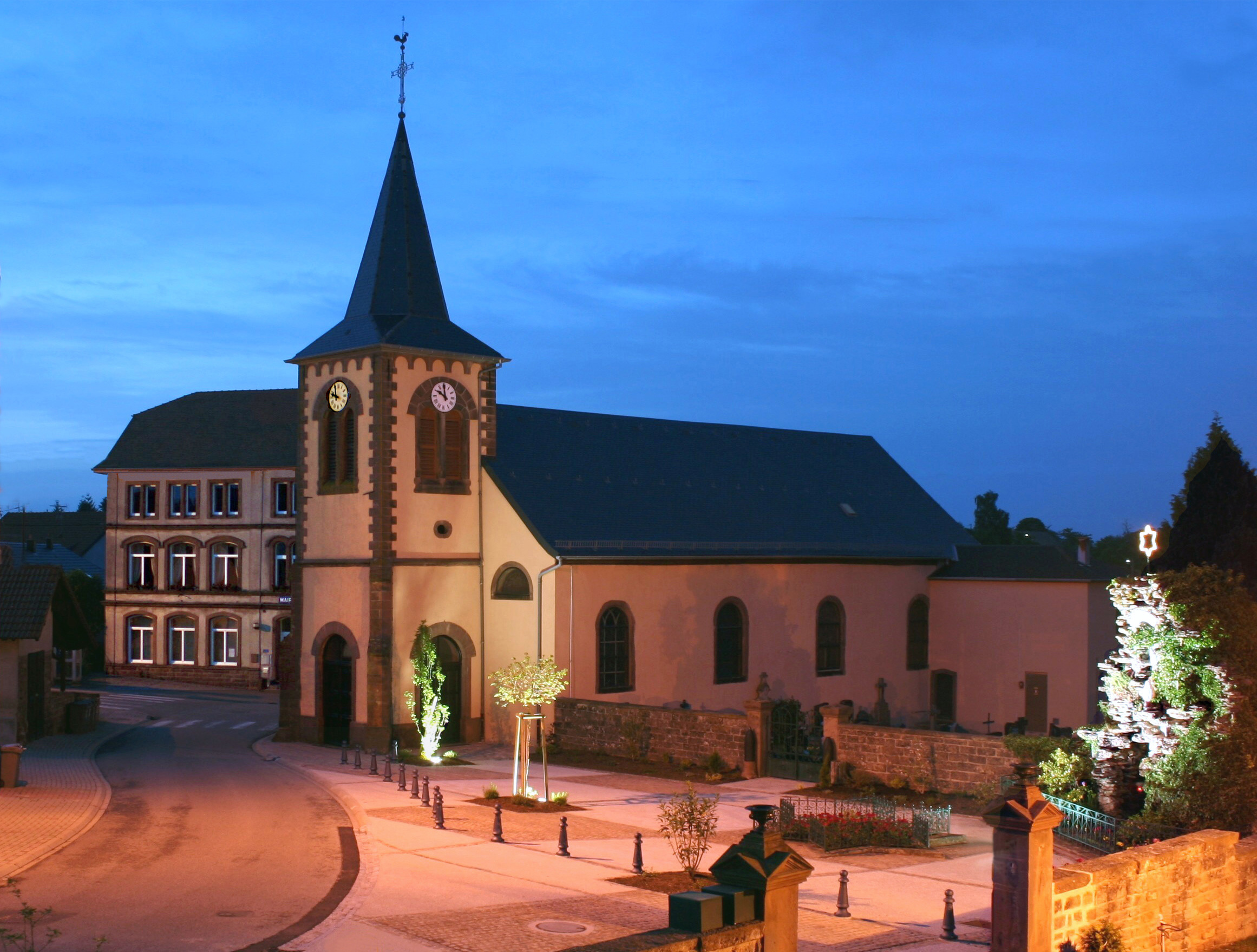 De gauche à droite : mairie, église et grotte de Lourdes du village de Garrebourg, Moselle